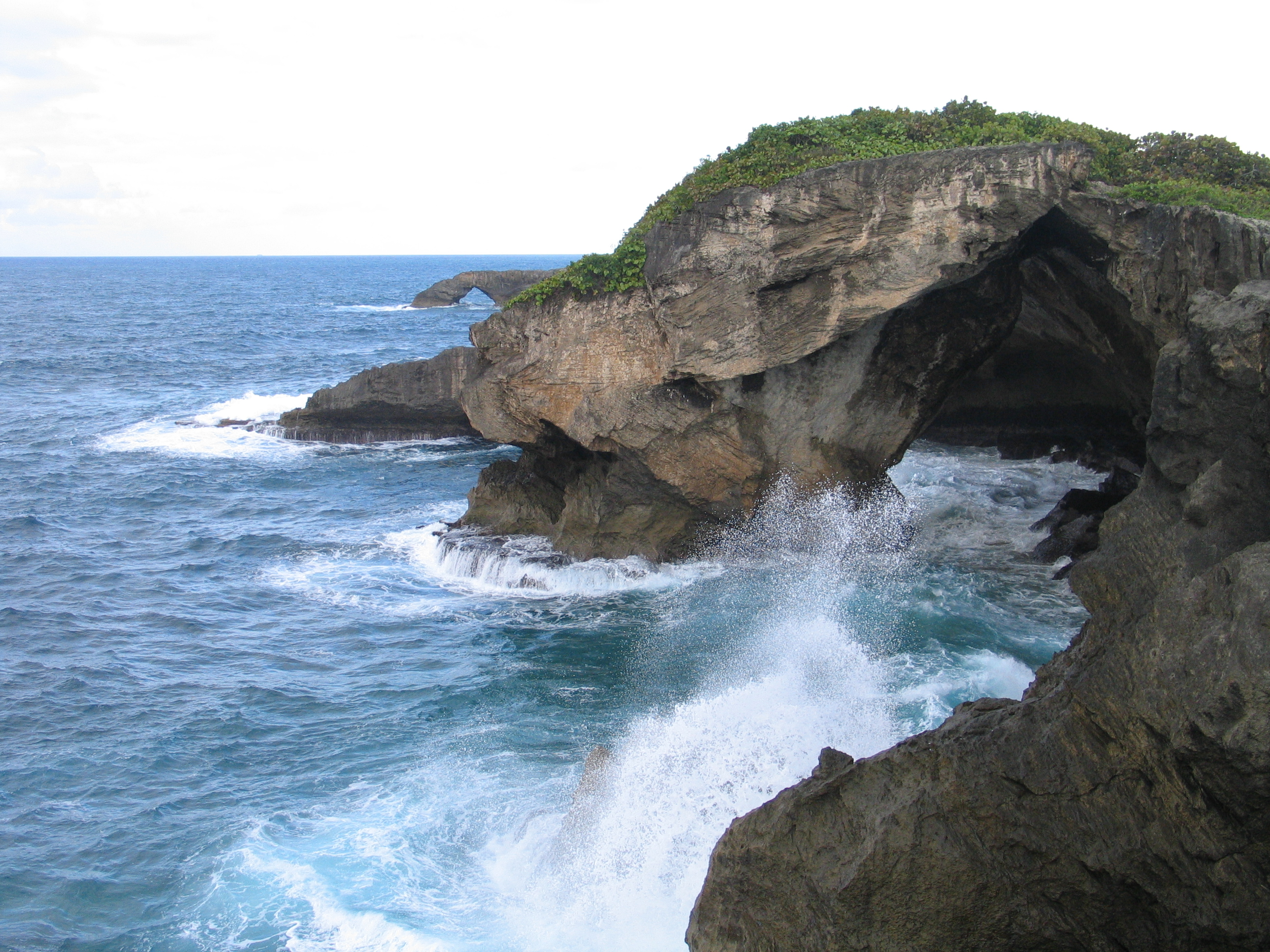 Coast scene in Barceloneta, Puerto Rico